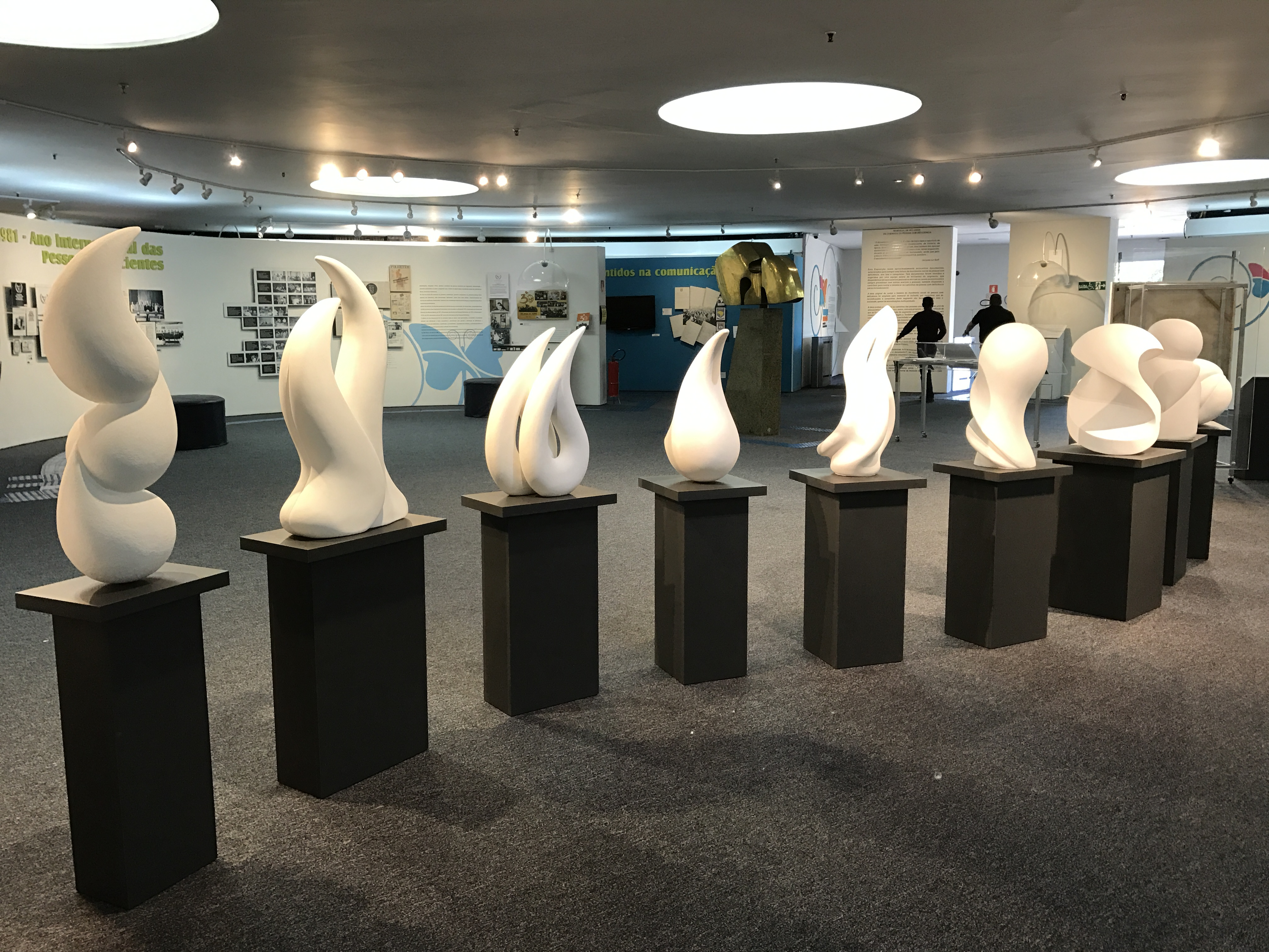 Esculturas da exposição "Movimento em Branco" de Alfonso Ballestero